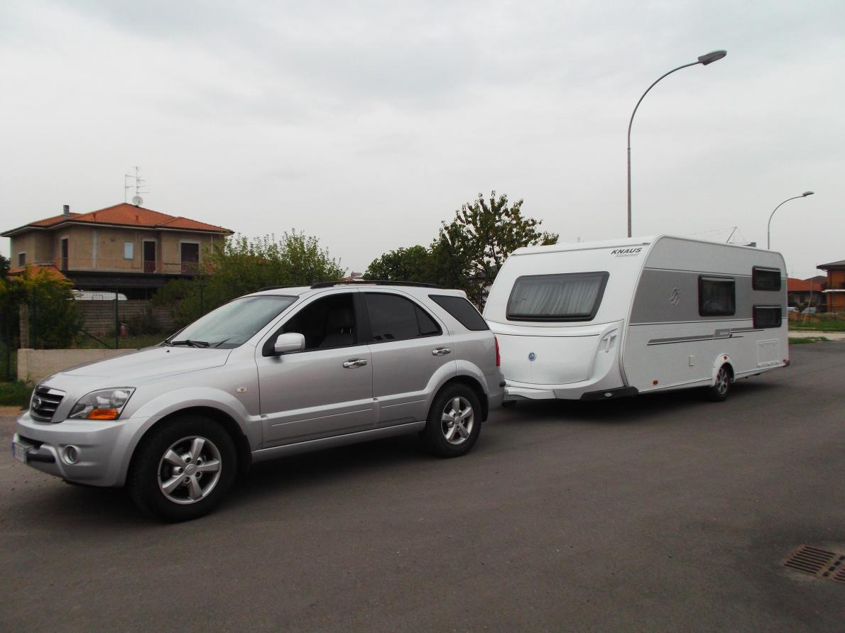 Moderno "Treno" roulotte + trattrice